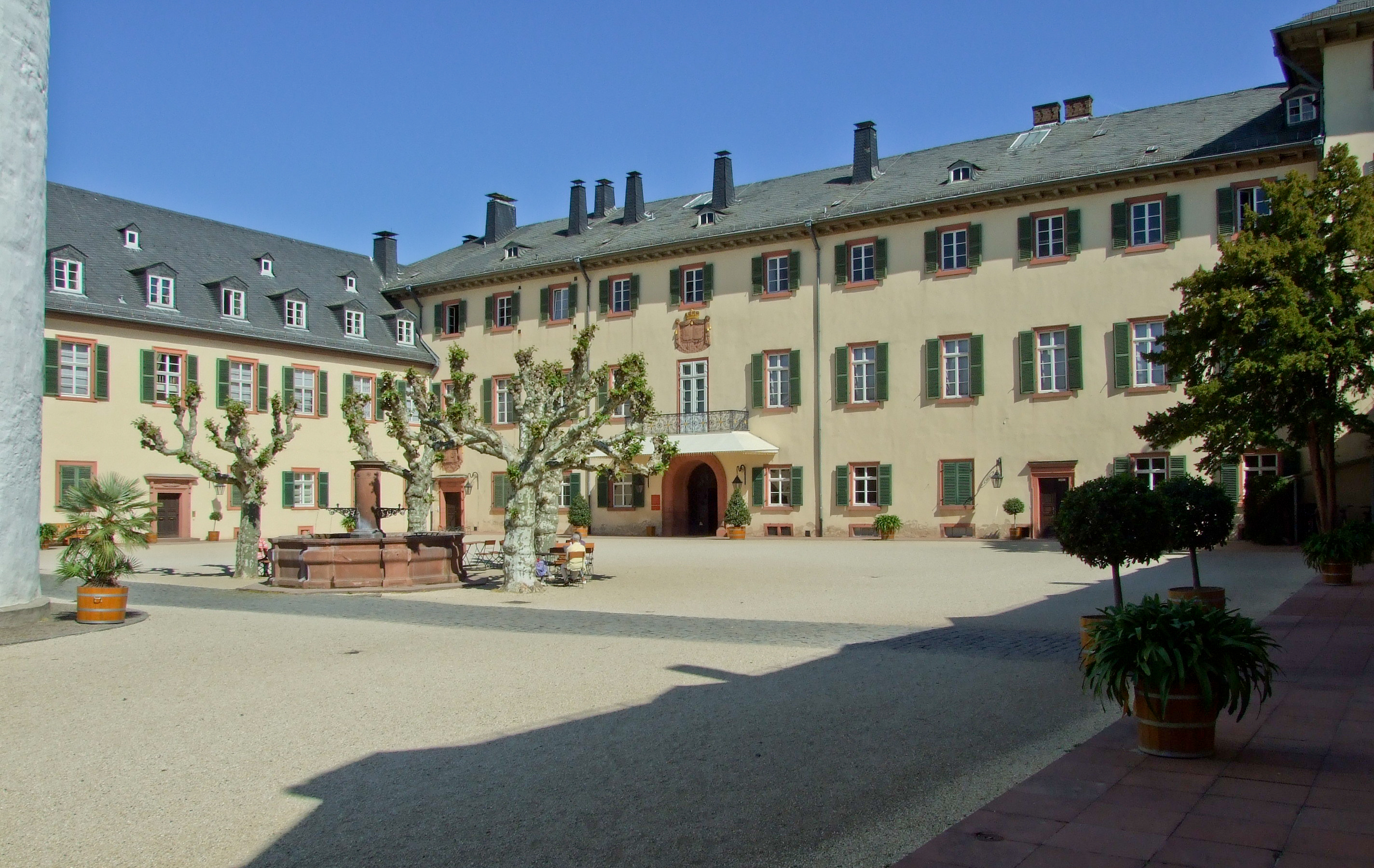 Schloss in Bad Homburg, 2. Hof.